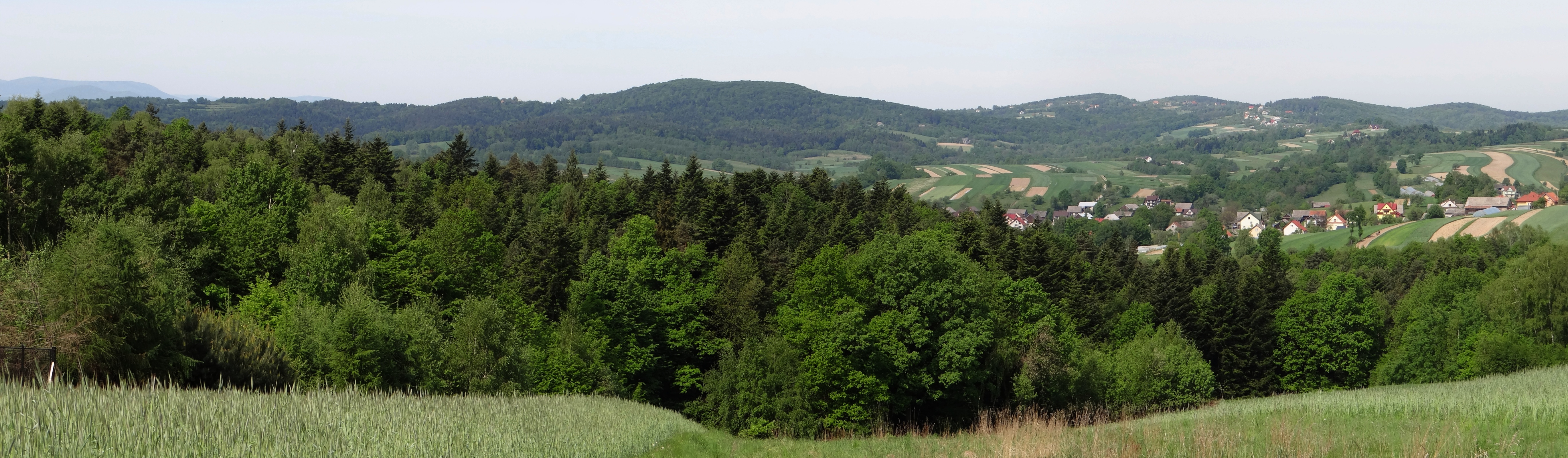 Ciąg wzgórz nad Stradomką (Wichras, Zonia i in.). Widok z szosy przez Leksandrową